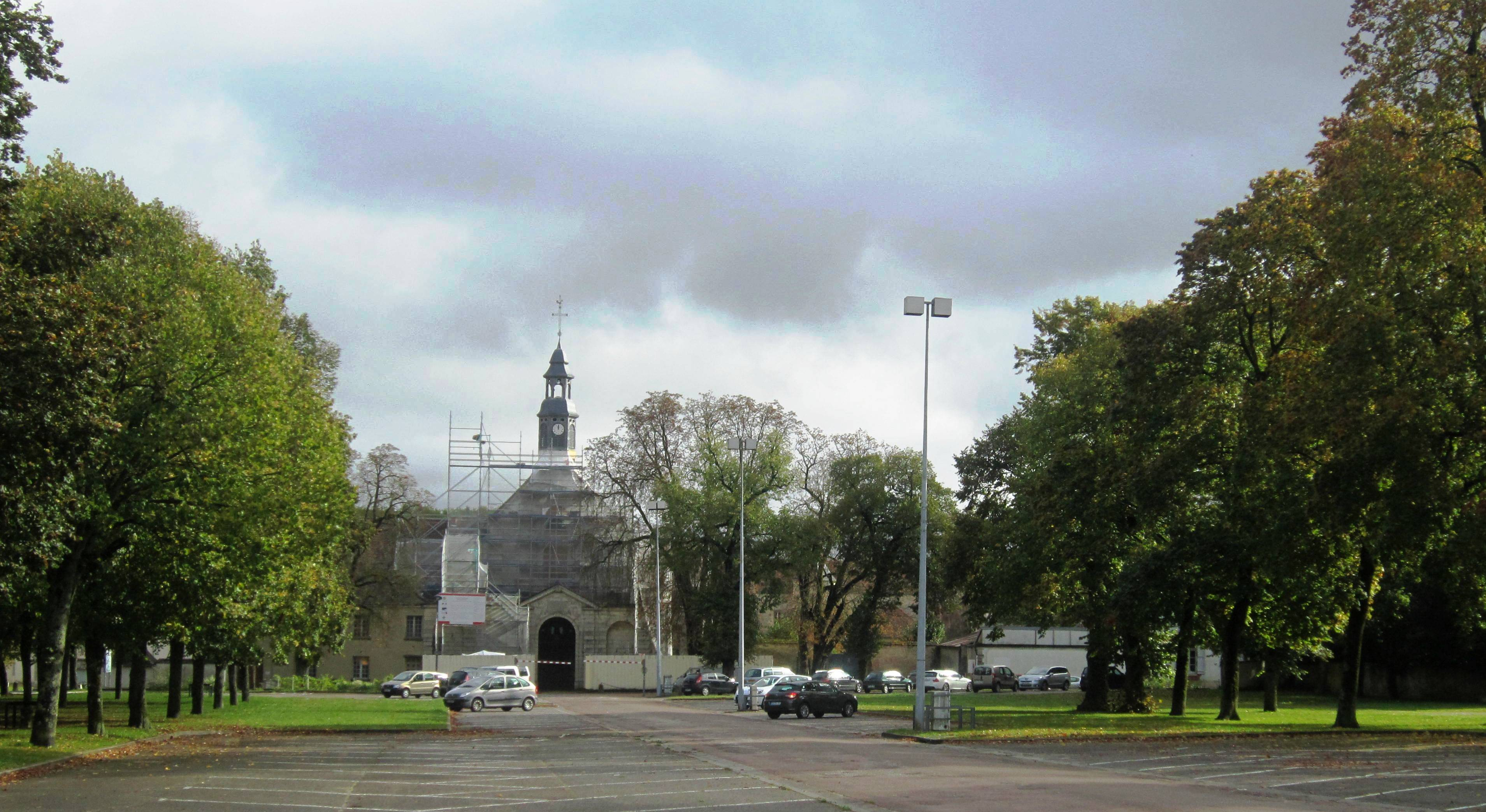 Perspective du cours Labbé. Au fond l'ex-abbaye Notre-Dame